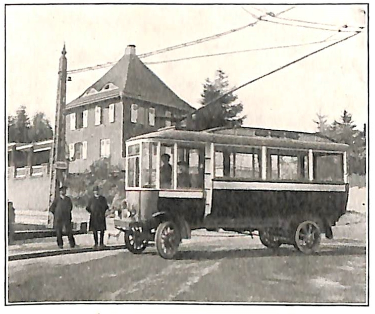 Wurzen - schienlose Fahrzeuge der Firma Max Schiemann & Co.